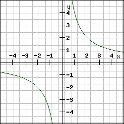 Dilstoša funkcija